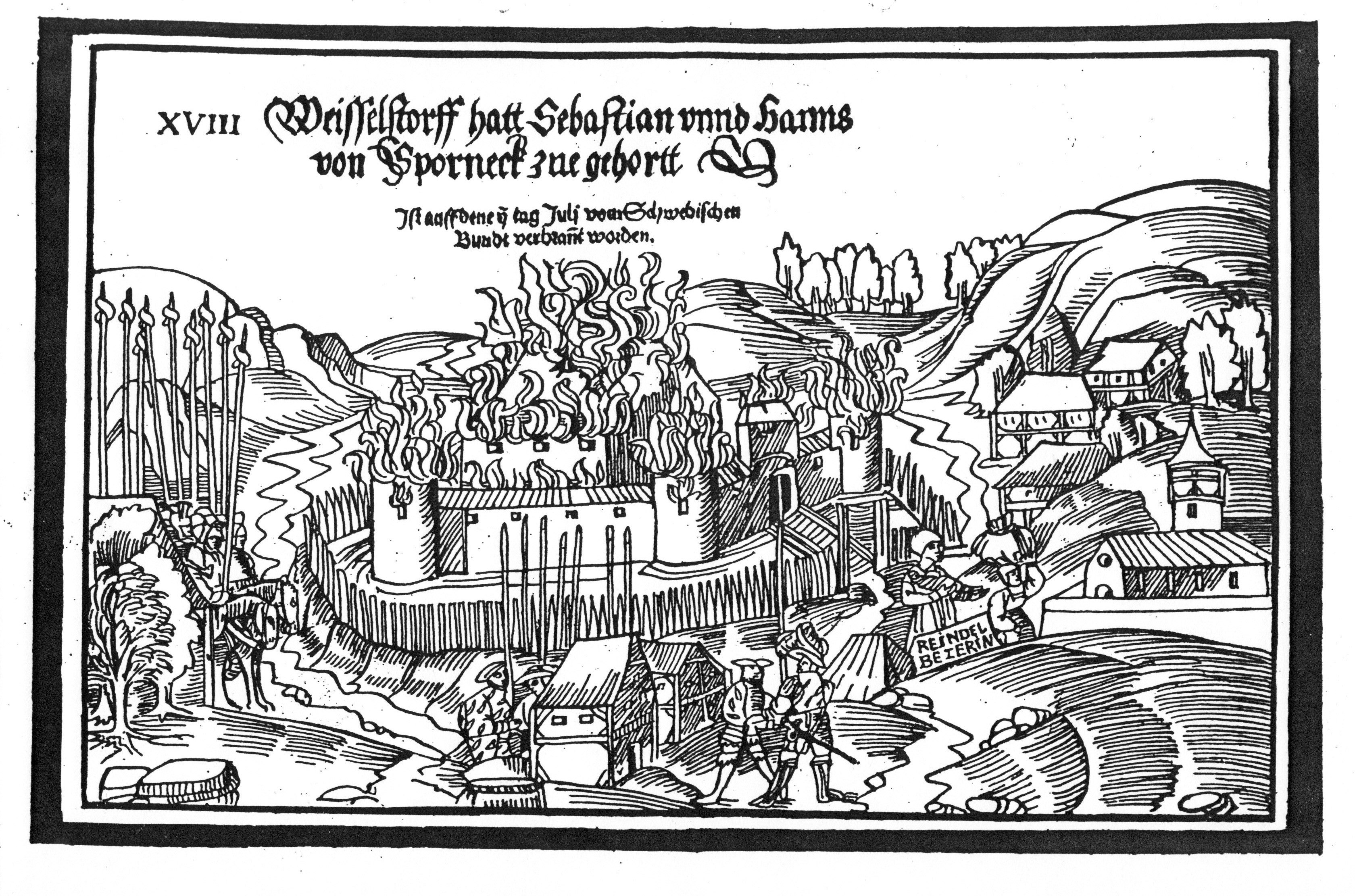 Wandereisen-Holzschnitt des Wasserschlosses in Weißdorf